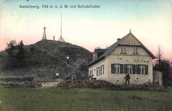 Turistická chata pod vrcholem kopce Špičák (Sattelberg) u vesnice Krásný Les (Schönwald) v Krušných horách. Pohlednici vydal hostinský Kajetan Ritschel ze Schönwaldu a byla vytištěna v roce 1910 tiskařstvím Th. C. Ruprechta v Drážďanech.